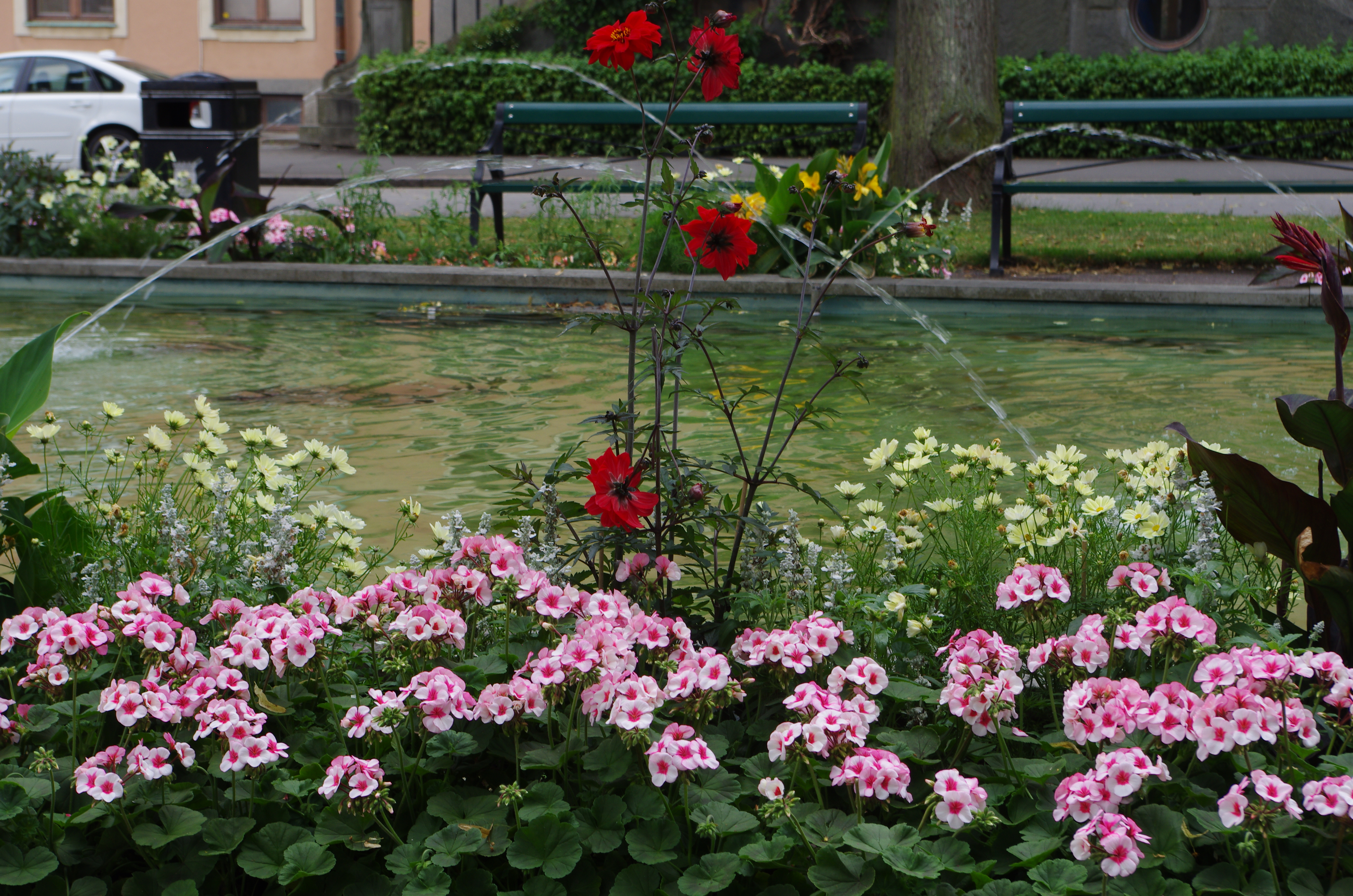 Björnbrunnen nära järnvägsstationen 2016